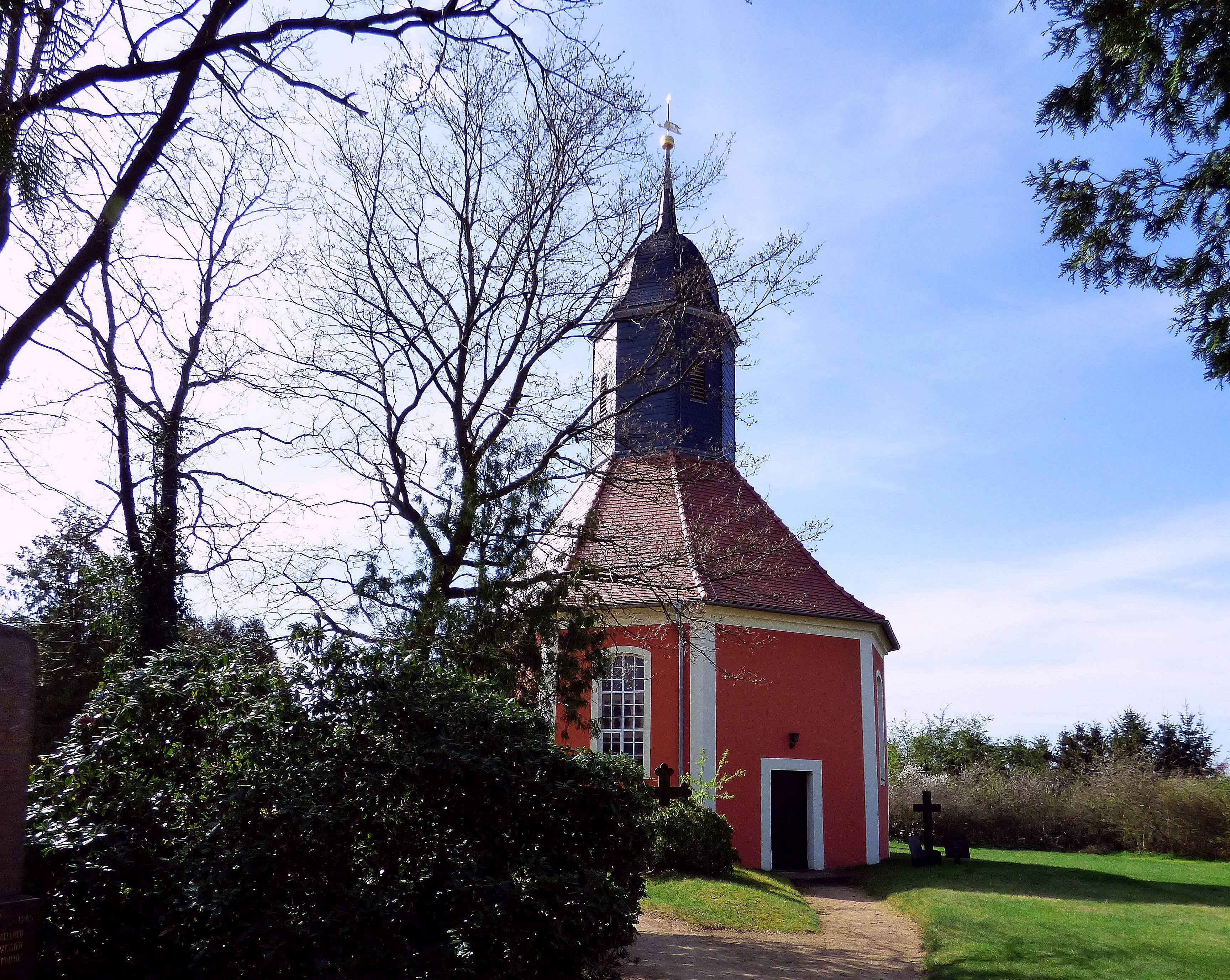 Dorfkirche Spansberg